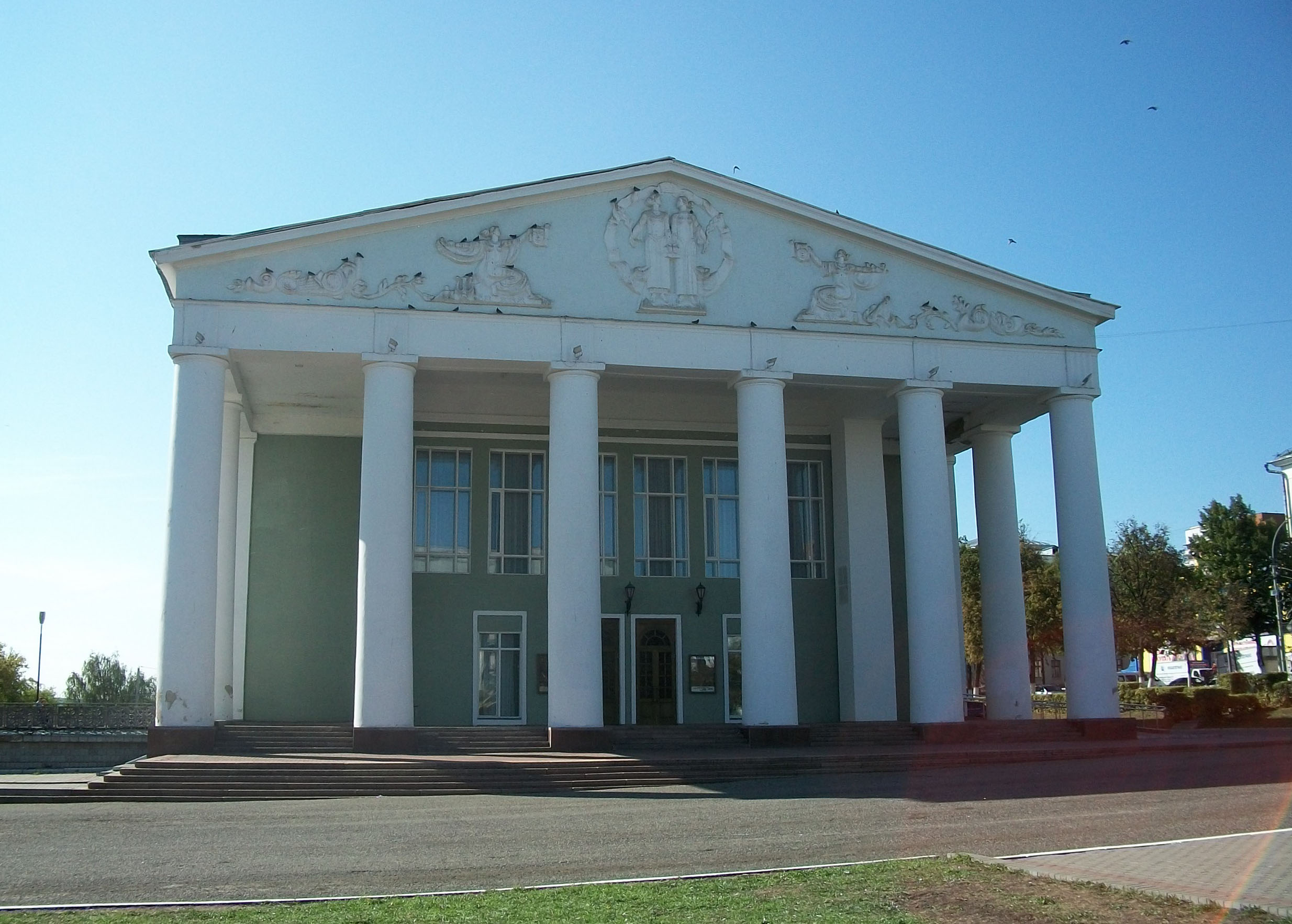 Здание, в котором располагаются Государственный музыкальный театр имени И. М. Яушева и Государственный русский драматический театр Республики Мордовия.